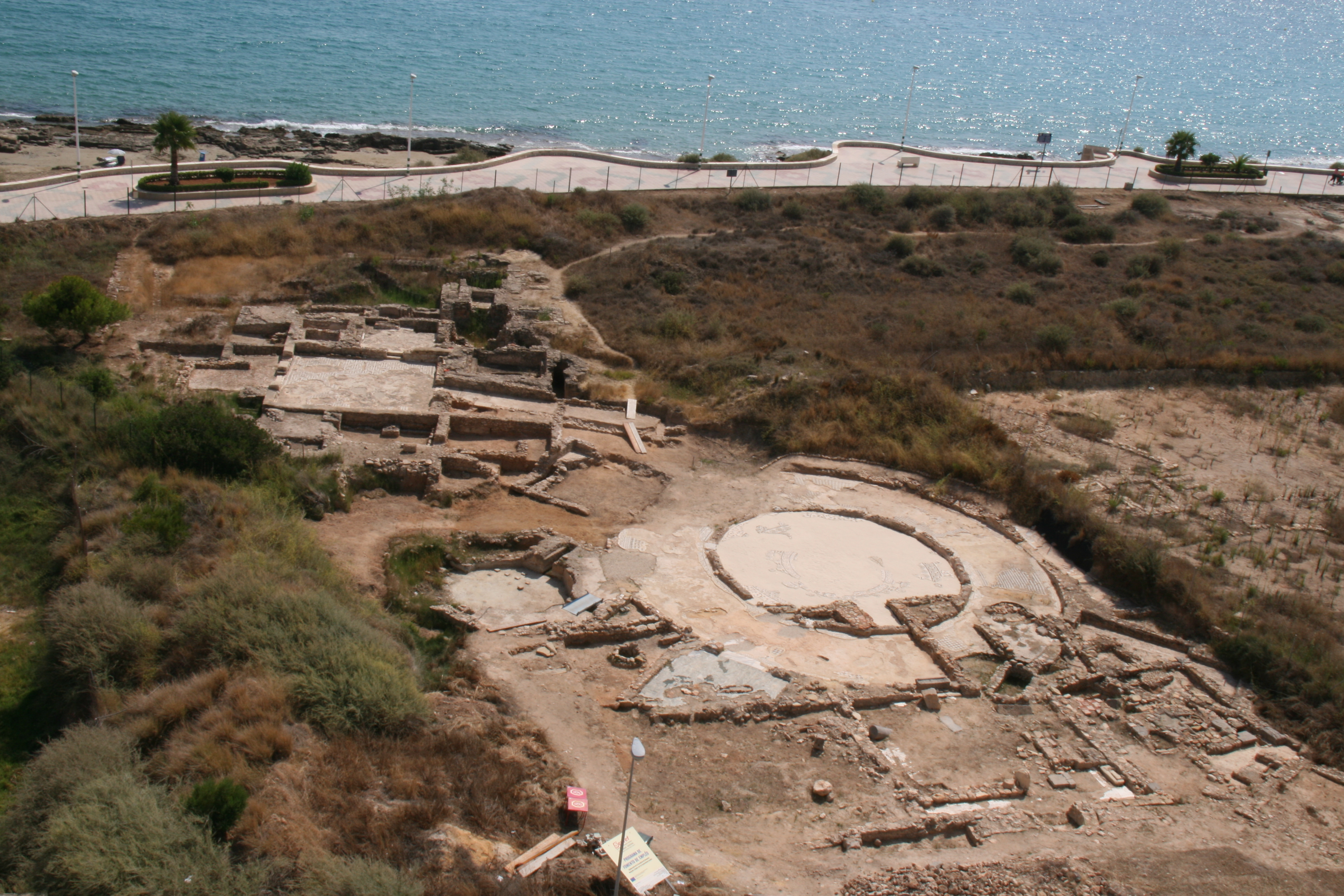 Baños de la Reina - Calpe - España